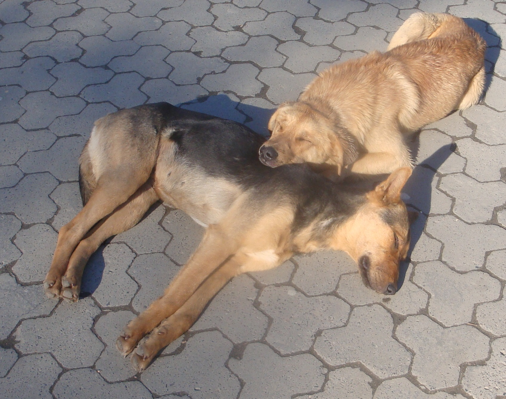 Двое беспородных собак (сучка и кобель) лежат на тротуаре, Трускавец.